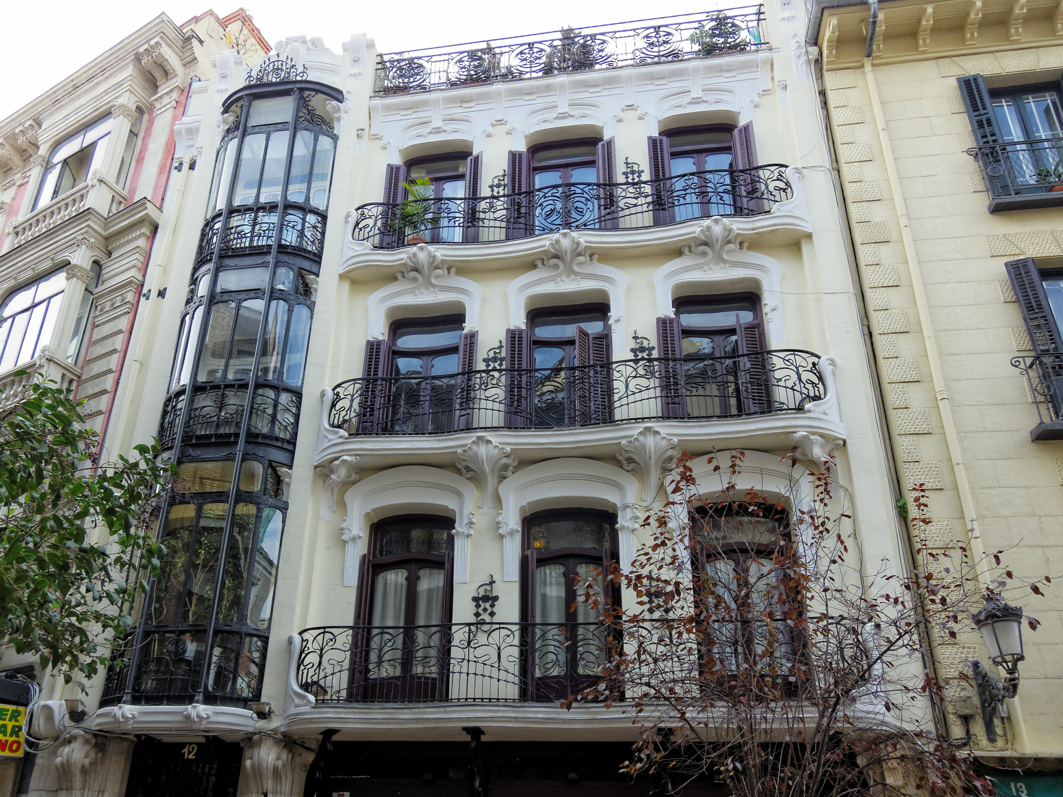 La Casa de Pérez Villaamil es un edificio de estilo modernista ubicado en la Plaza de Matute Nº 12 de Madrid.